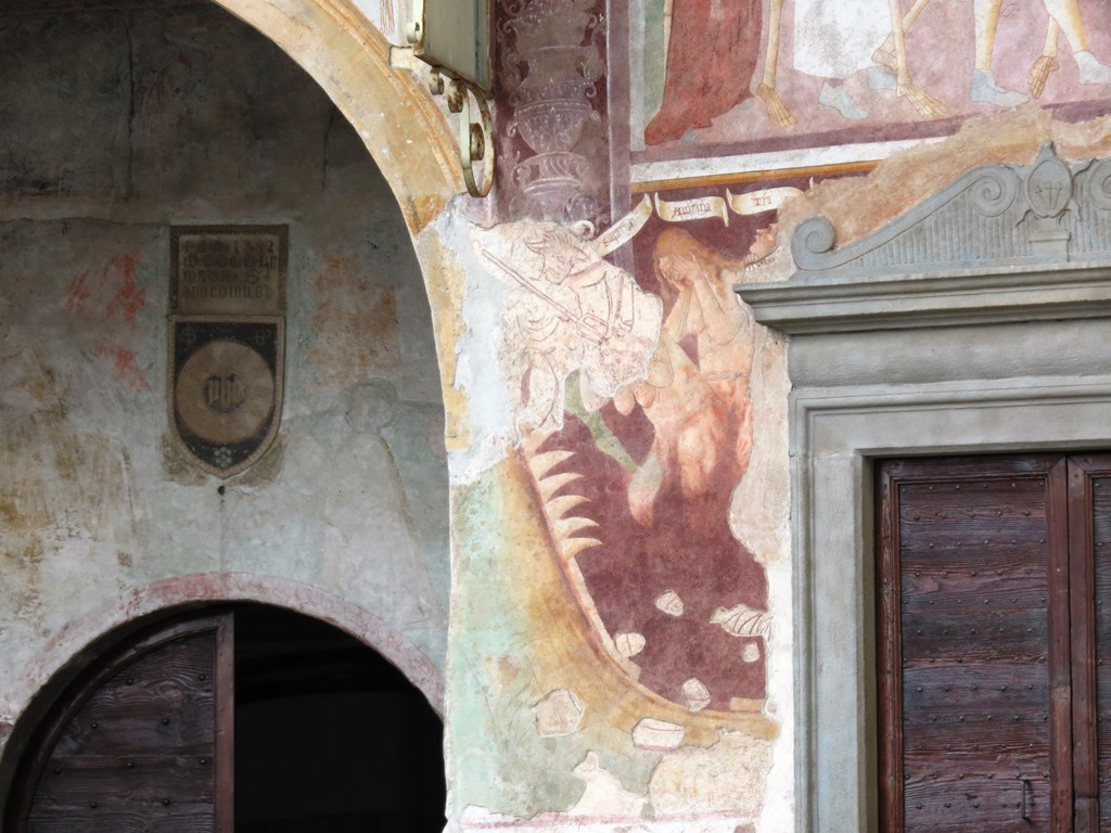 Dannati - Oratorio dei disciplini - Clusone